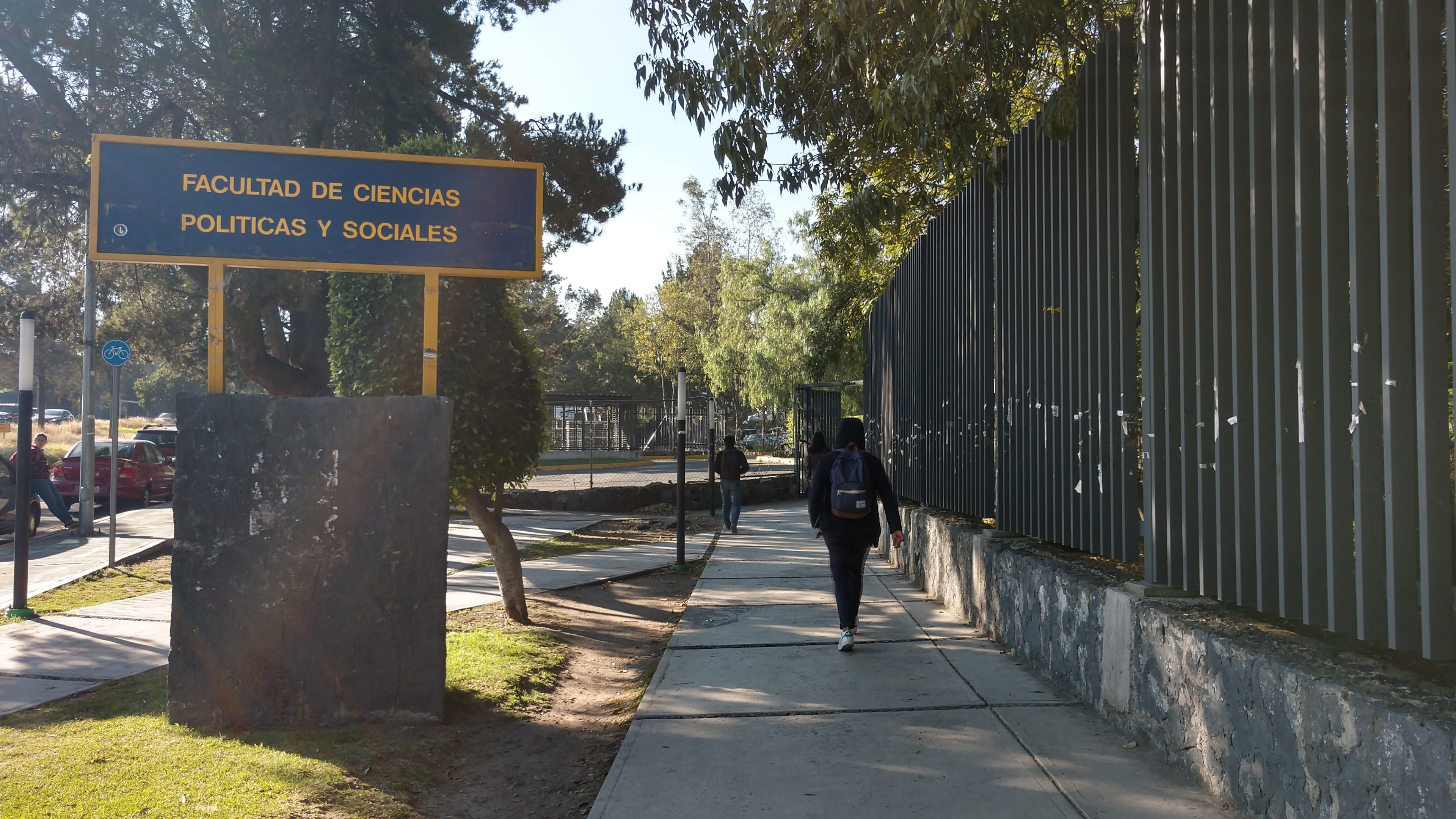 Ciudad Universitaria, Ciudad de México, México.